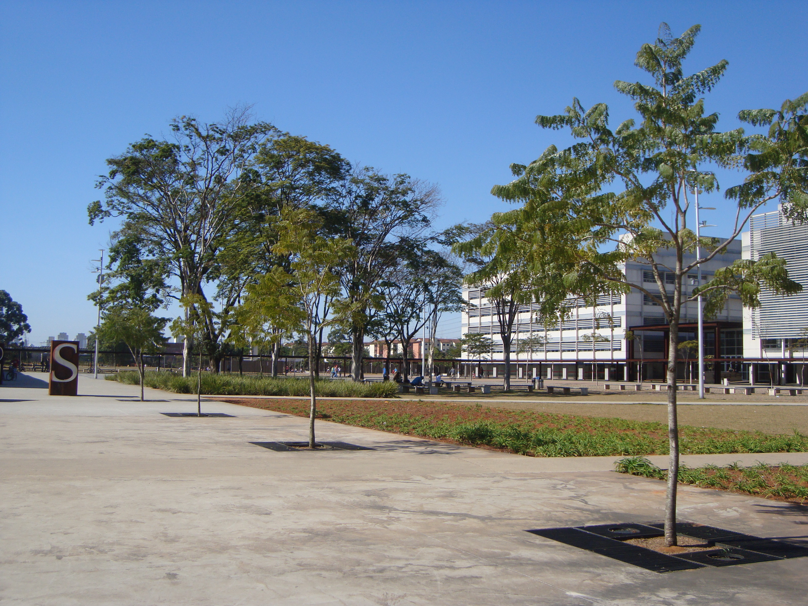 Foto dos edifícios do Parque da Juventude, localizado no distrito de Santana, Zona Norte paulistana. Sp/ Brasil